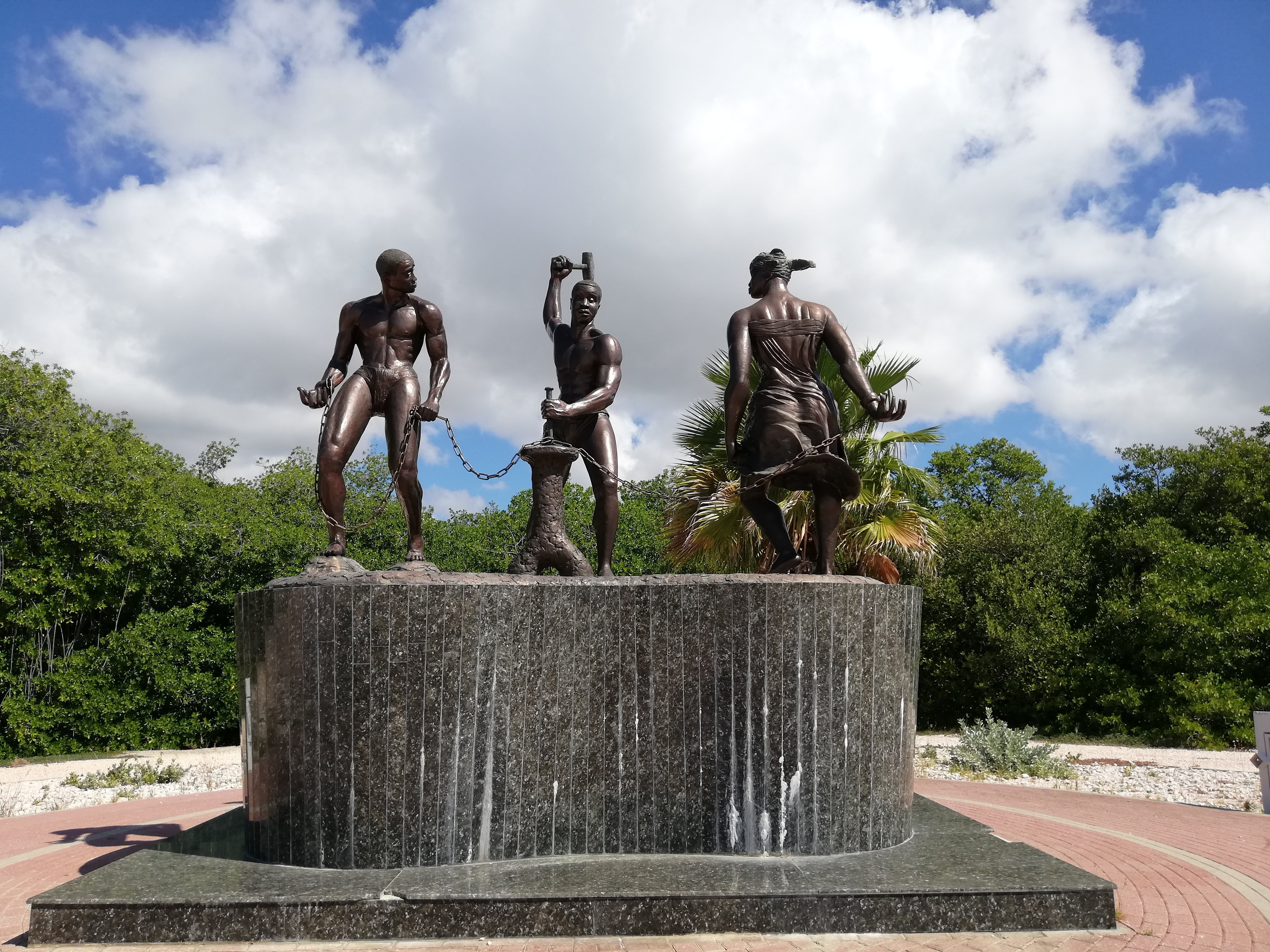 Monument for emancipation Desenkadená, Parke di Lucha pa Libertat, Willemstad, Curaçao, door Nel Simon